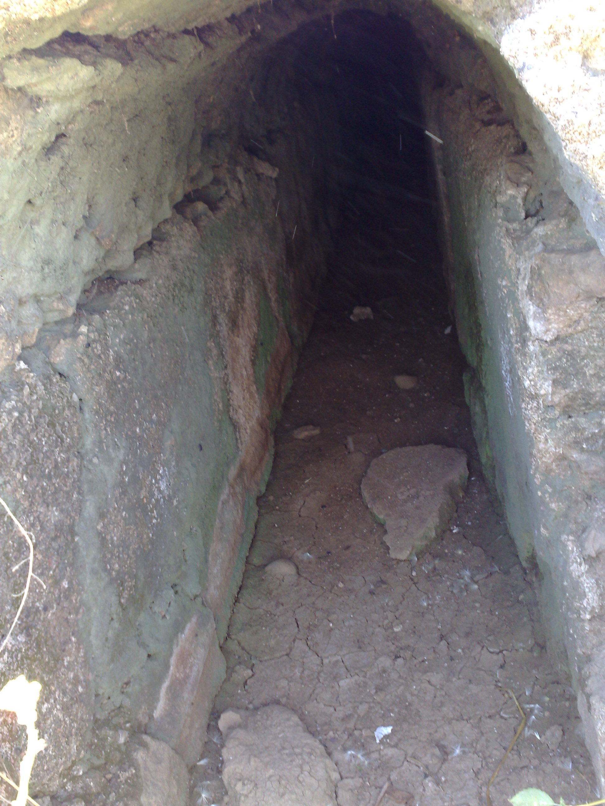 Imagen tomada en el interior del acueducto romano del siglo II que se encuentra entre Olivares y Gerena y que va hacia Itálica